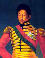 Radama, roi de Madagascar. D'après un tableau de Ramanankirahina (1905), copié sur l'original peint par Coppalle en 1825. La photographie à l'origine de l'image scanée a été faite par le Service d'information de la République de Madagascar au début des années 60. Image libre de tout droit.